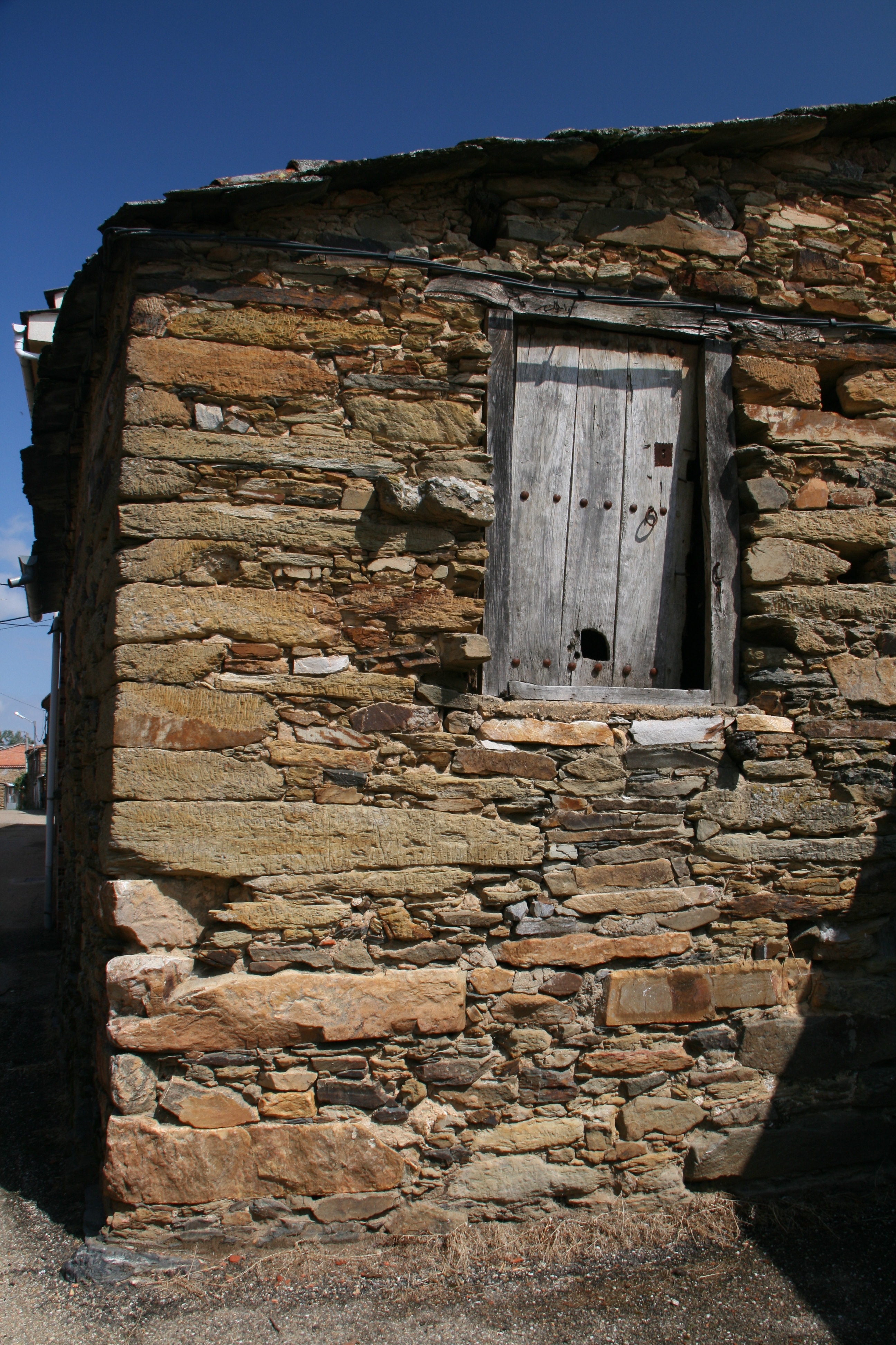 Pobladura de Aliste - Pajar (Acceso elevado a un pajar)